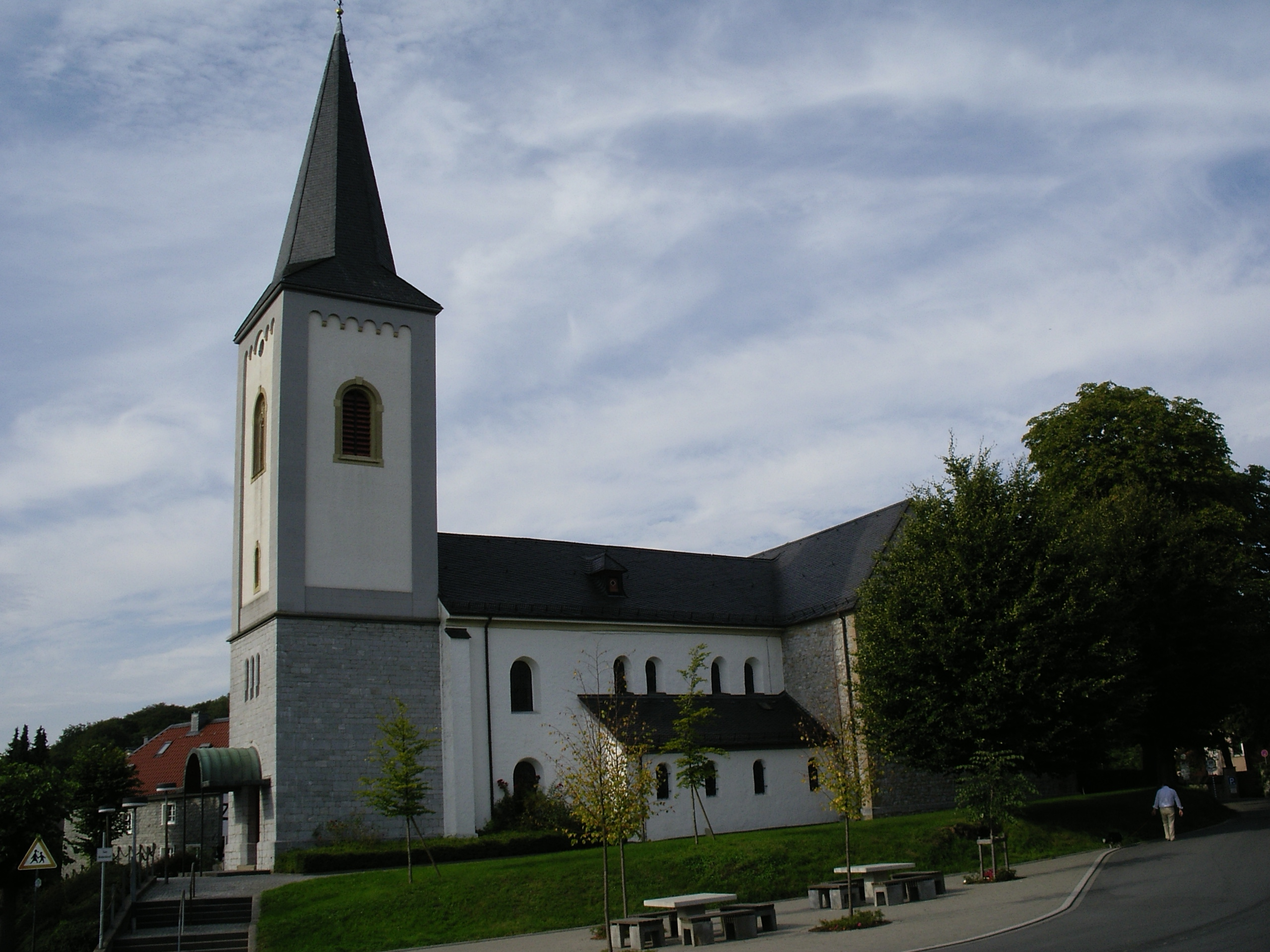 Kirche St. Maximin, Dorf Düssel, Wülfrath, Germany